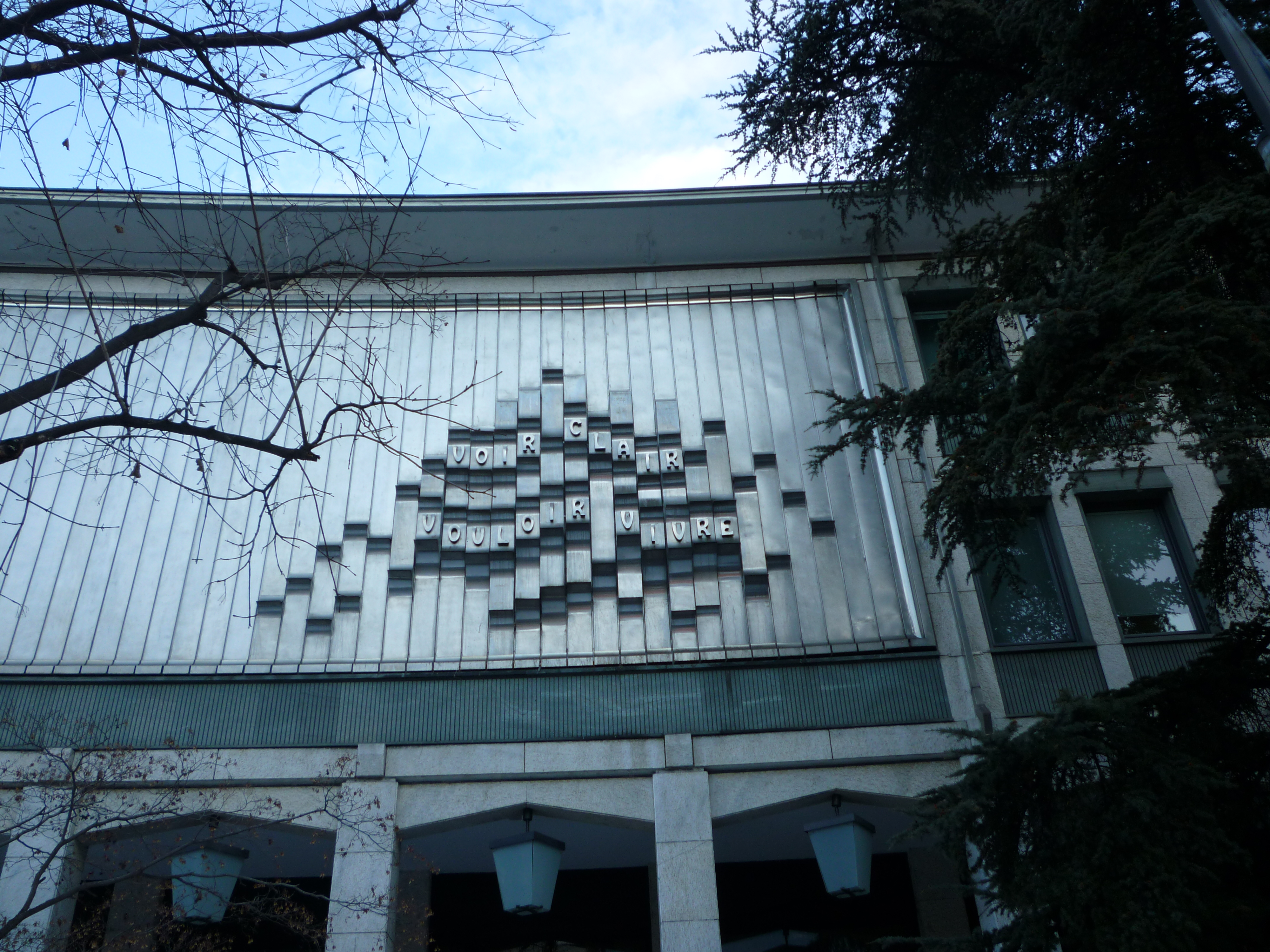 Devise du gouvernement régional de la Vallée d'Aoste (Italie)